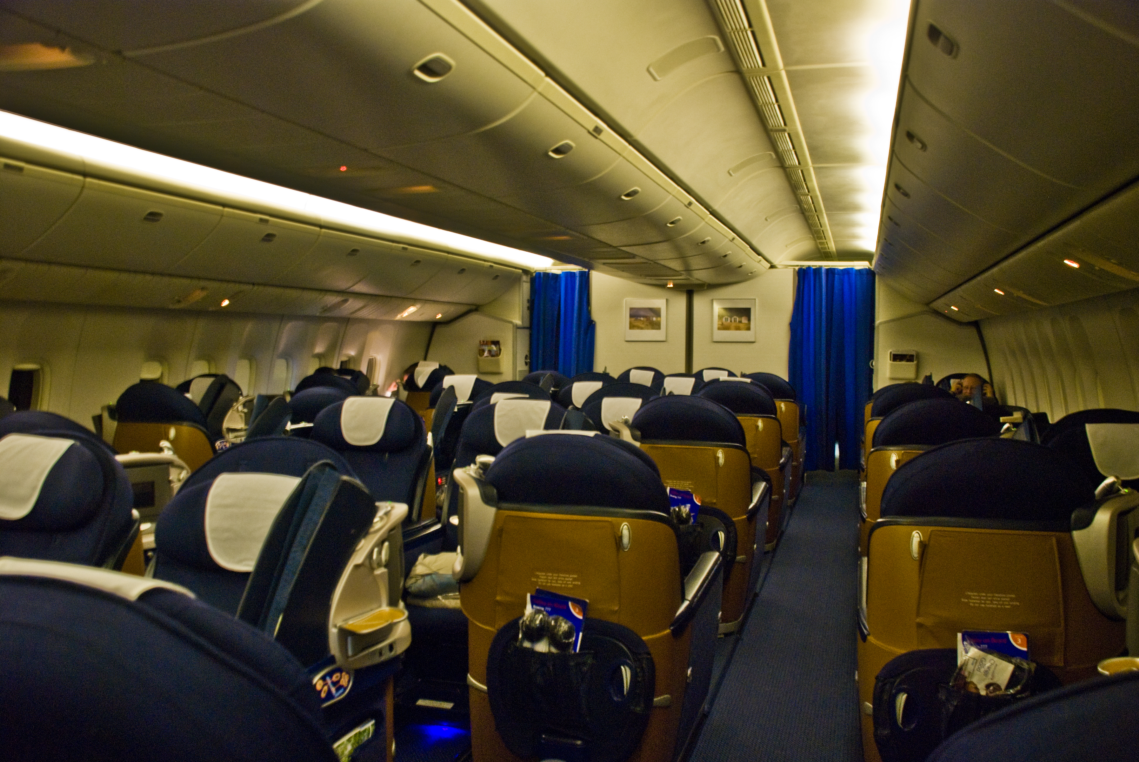 BA 777